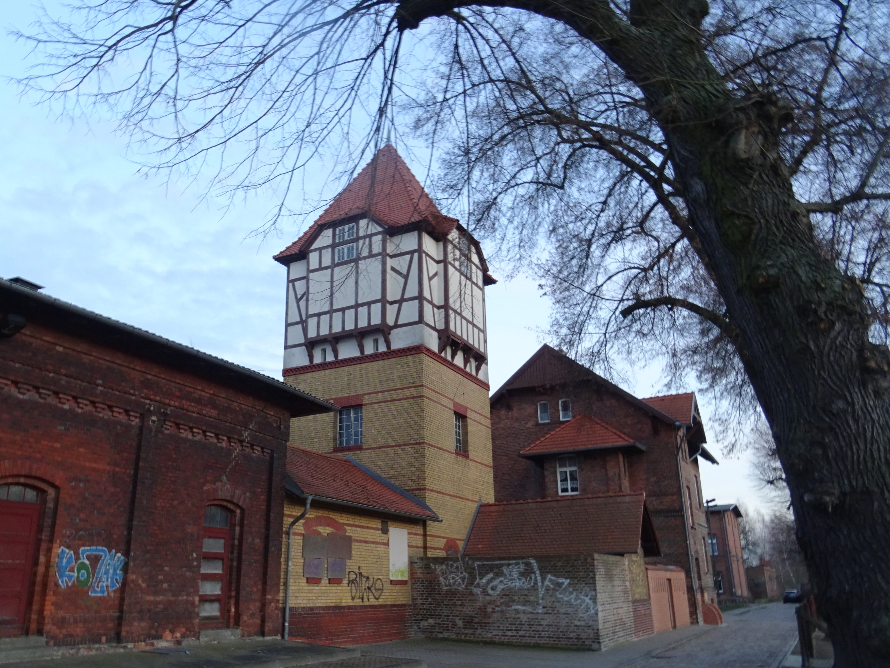 Bahnhof Bad Freienwalde,Wasserturm und Nebengebäude, 2020